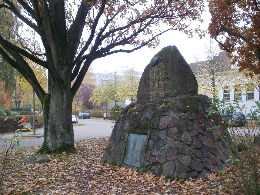 Denkstein und drei Eichen für die Gefallenen beider Weltkriege in Hamburg-Jenfeld.